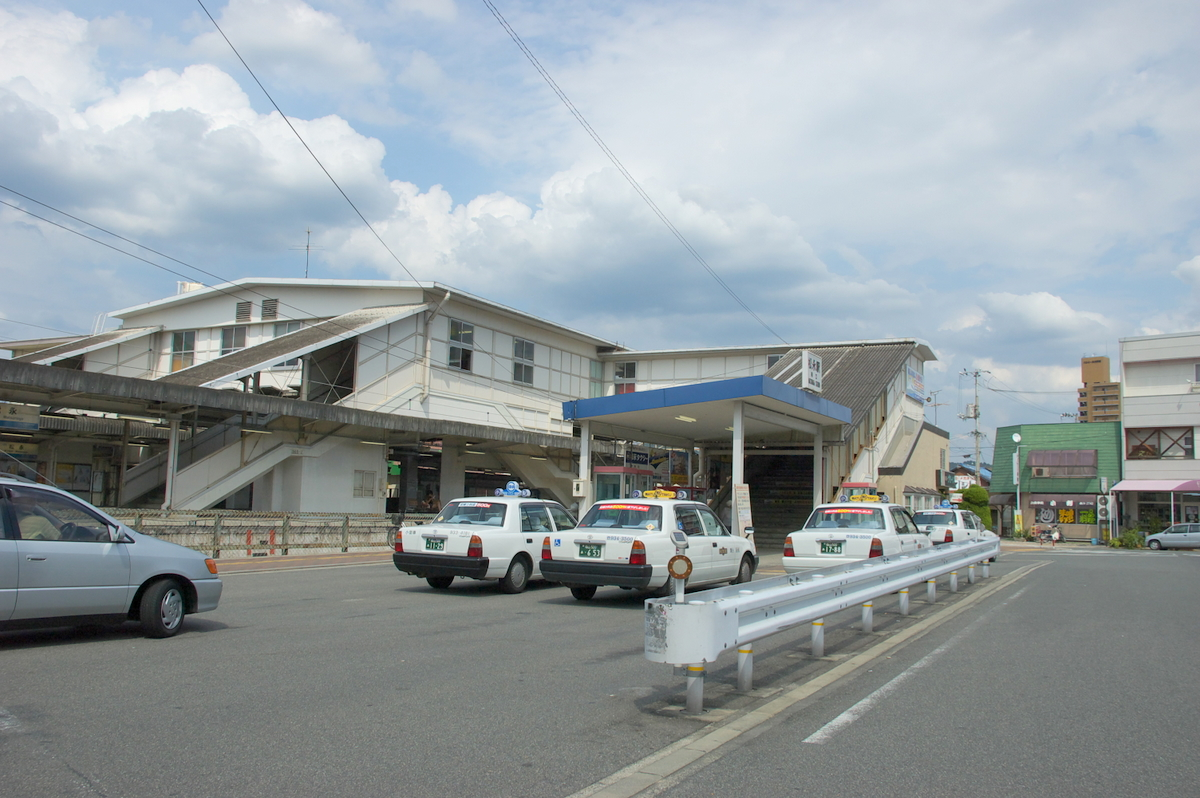 松永駅 Matsunaga station